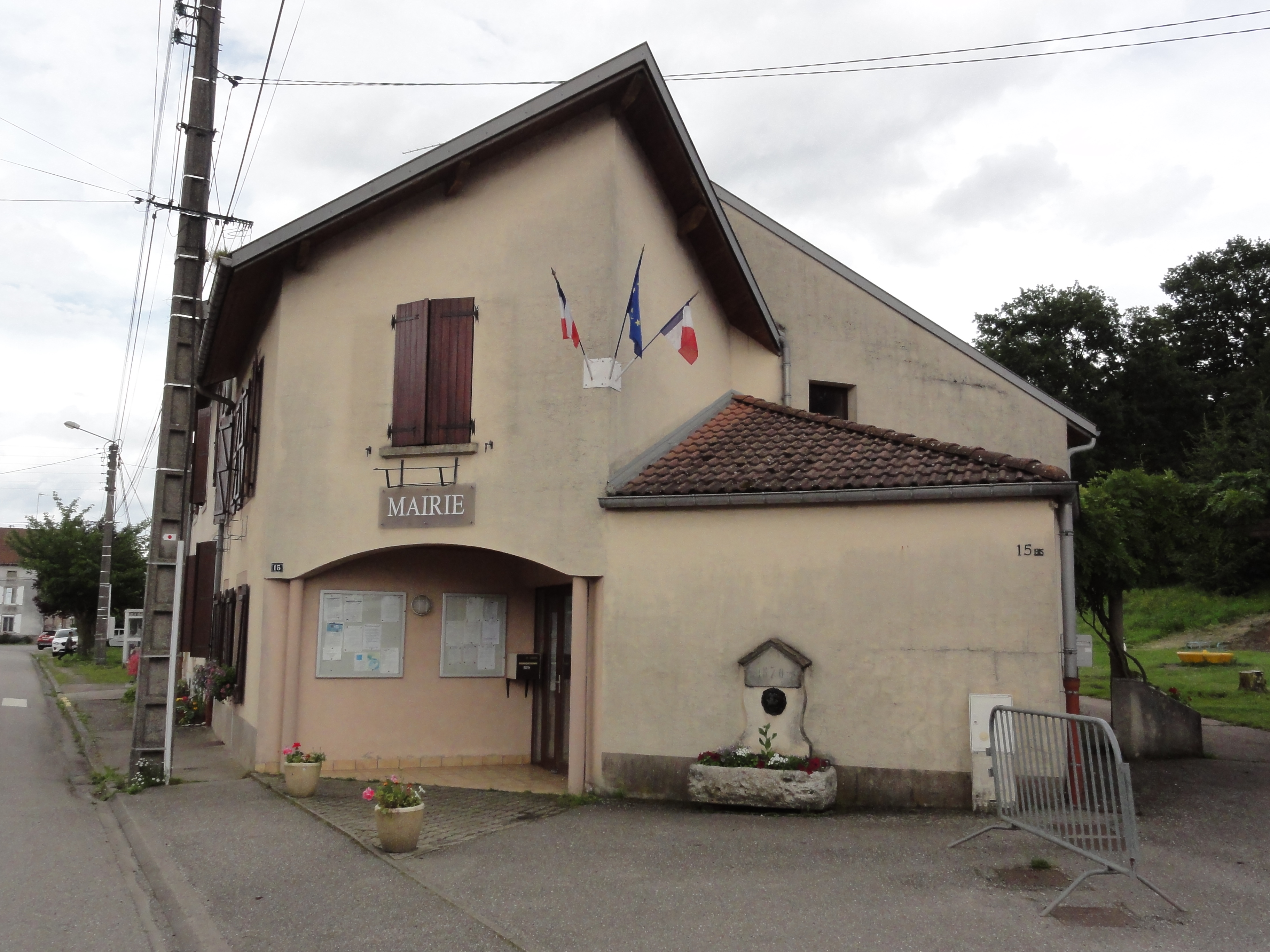 Vathiménil (M-et-M) mairie